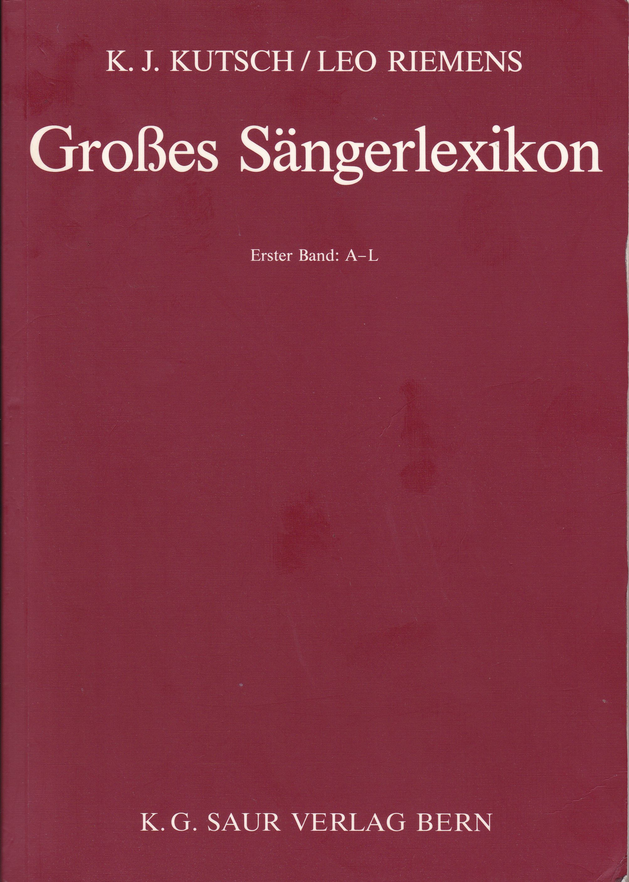 Einband des Großen Sängerlexikons, Ausgabe von 1993